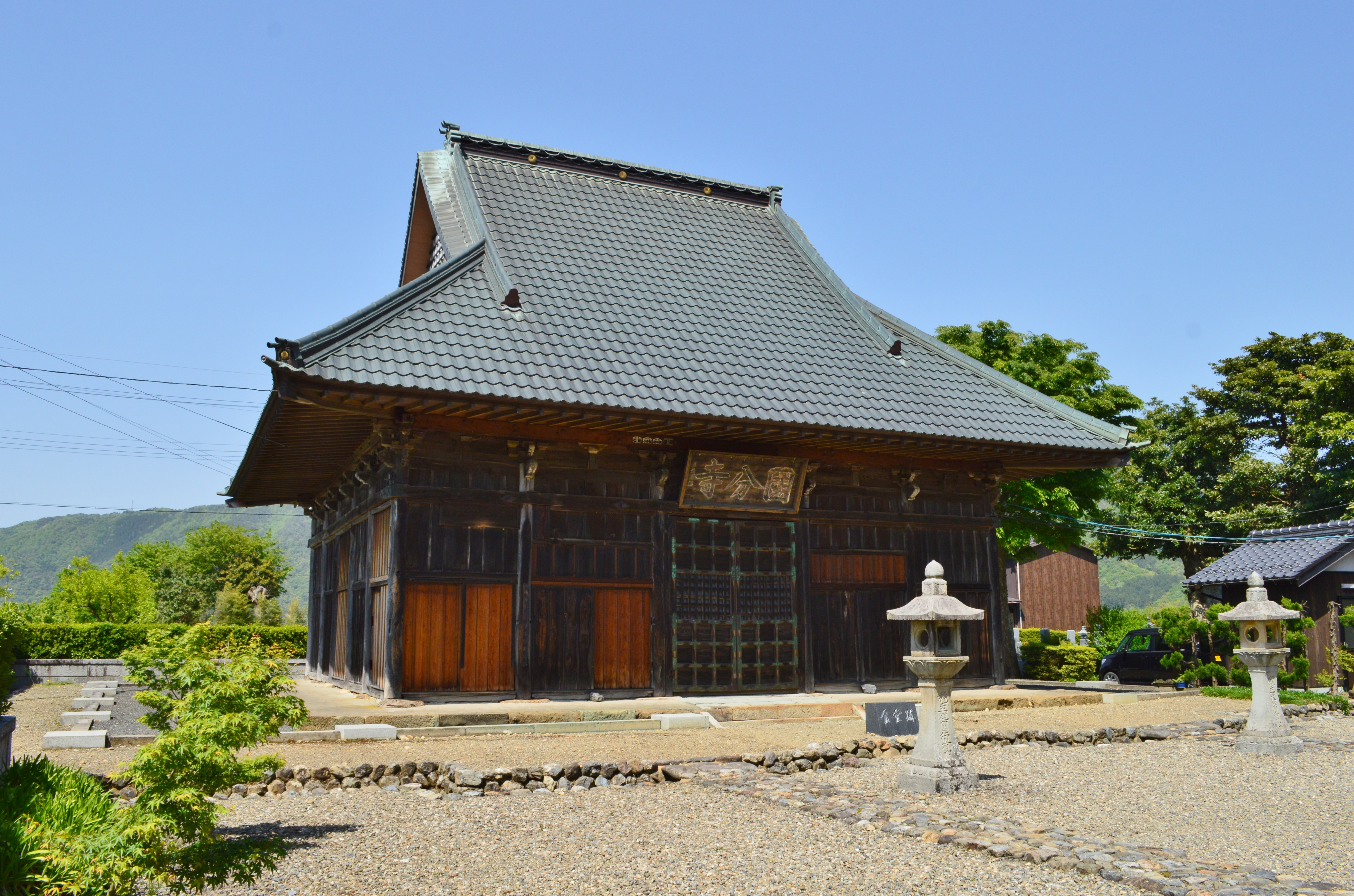 若狭国分寺 釈迦堂